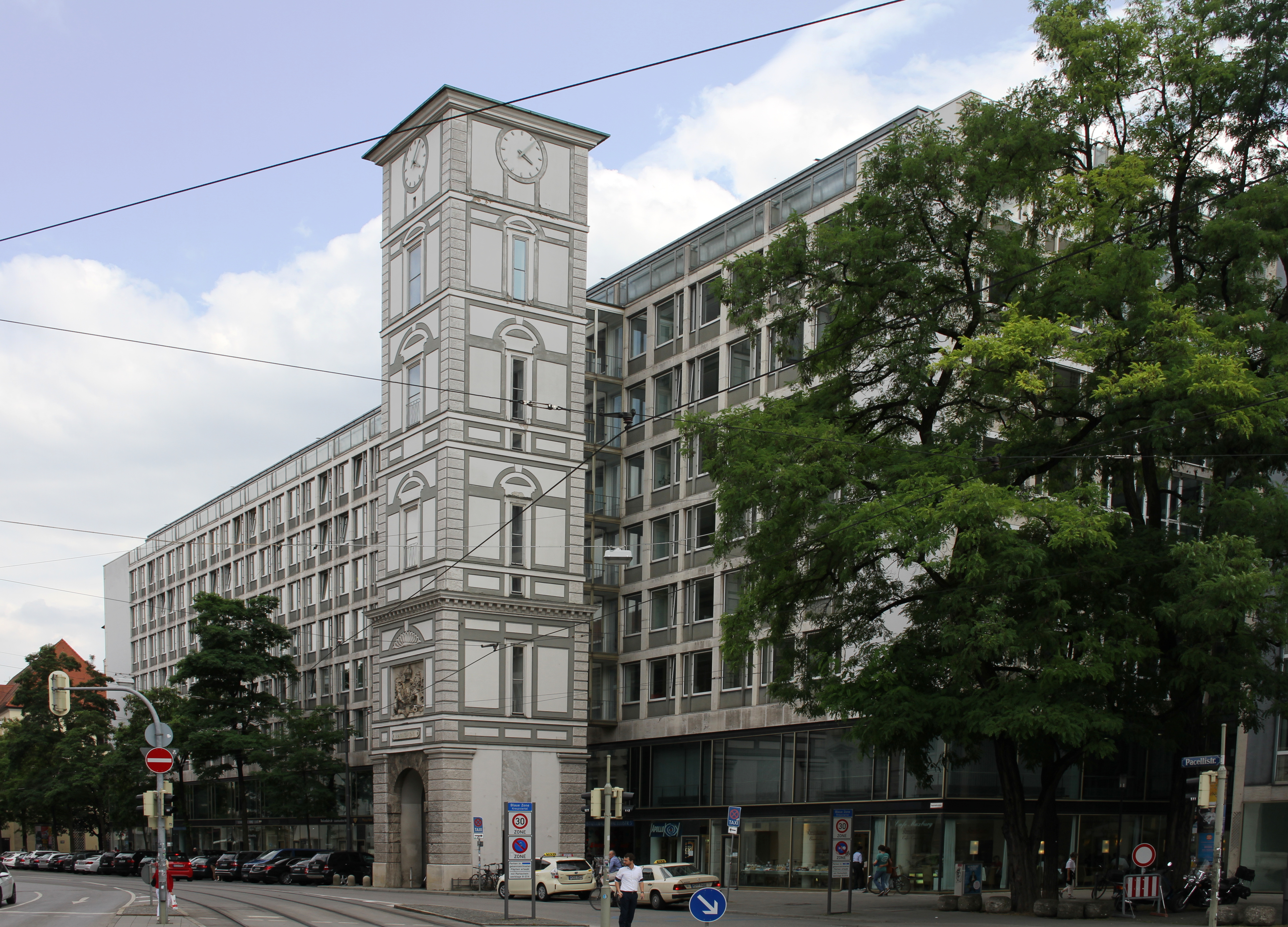 Maxburg, Der Renaissance-Turm ist der einzige erhaltene Bauteil